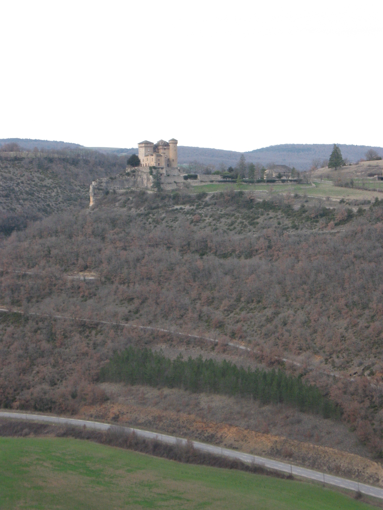 Château de Cabrières - Compeyre (Aveyron). Vue prise depuis la commune d'Aguessac.